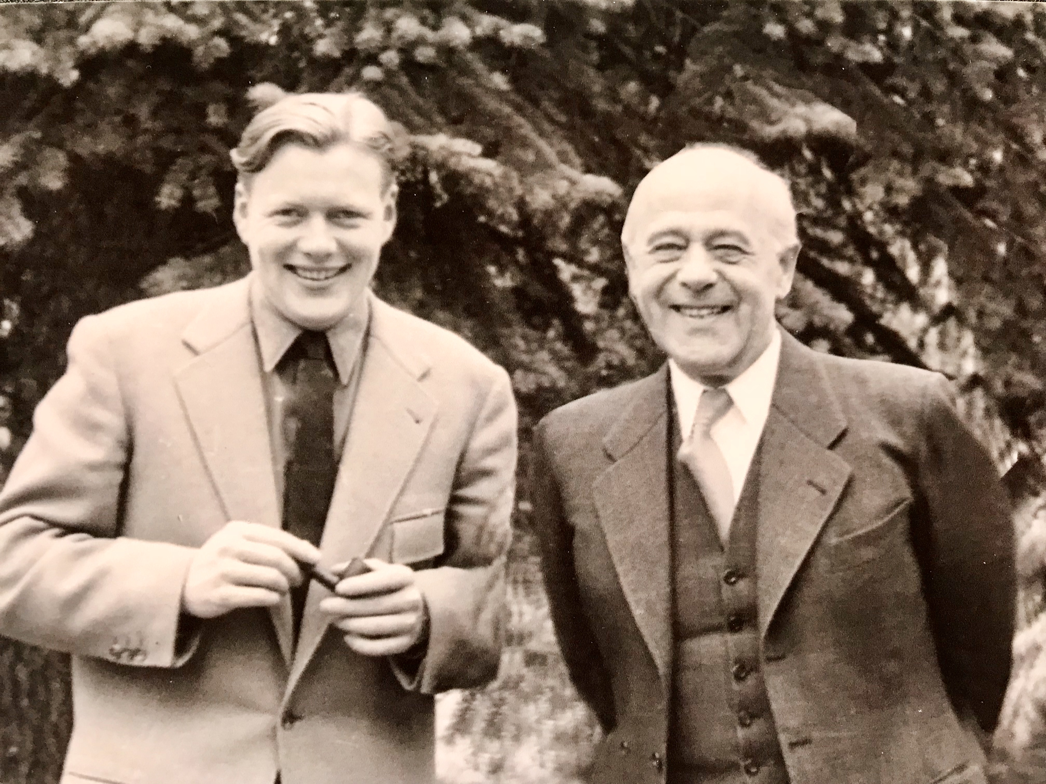 G. Patzig (l.) und J. König, Göttingen 1958